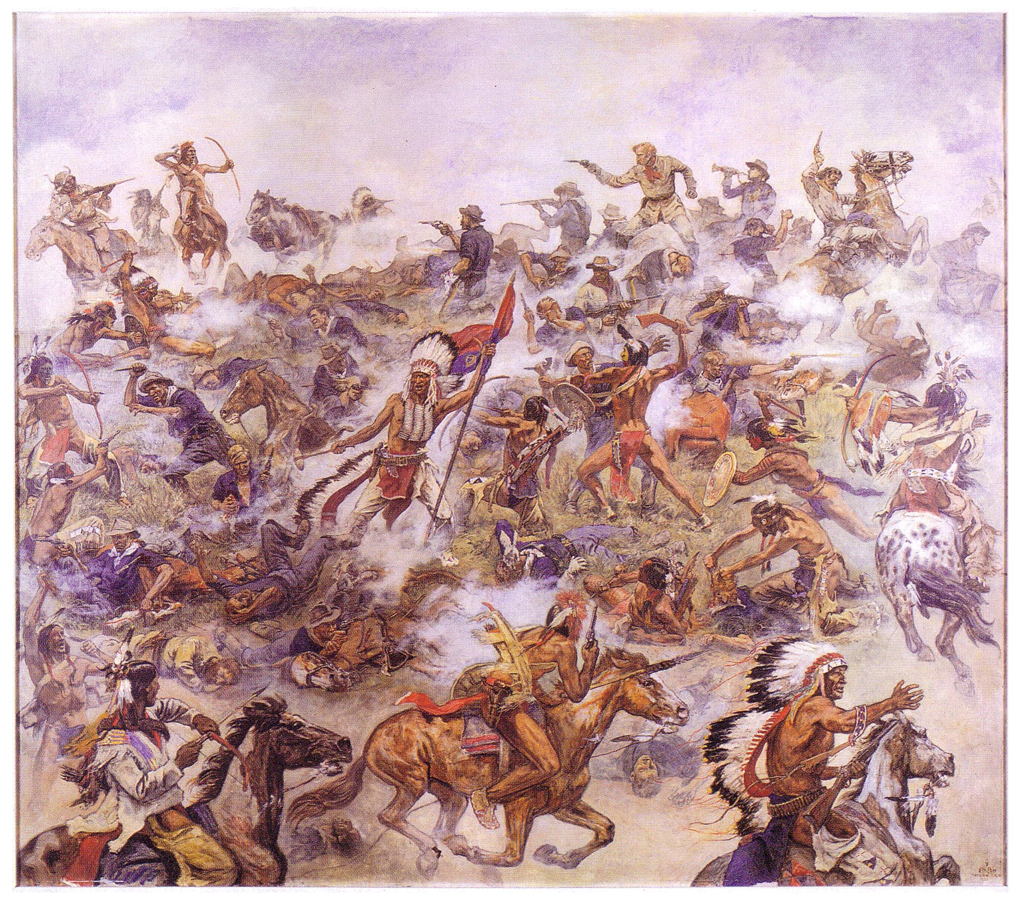 Elk EberːDie Indianerschlacht am Little Big Horn, 1936 (2,0 m. x 1,75 m.), Karl-May-Museum in Radebeul